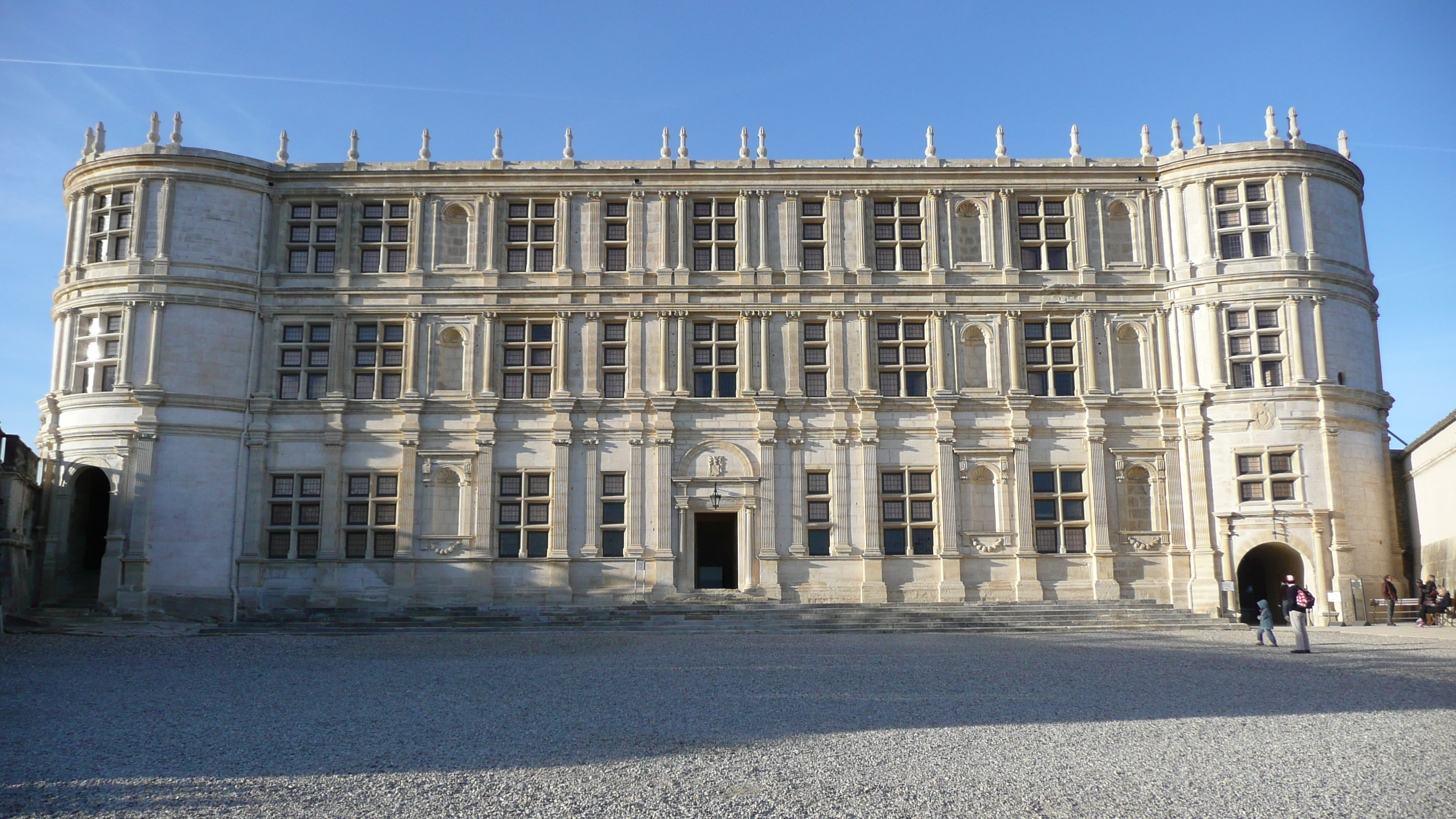 A Grignan, dans la Drôme (France), le célèbre château et sa somptueuse façade Renaissance, dite aussi François Ier, récemment restaurée.